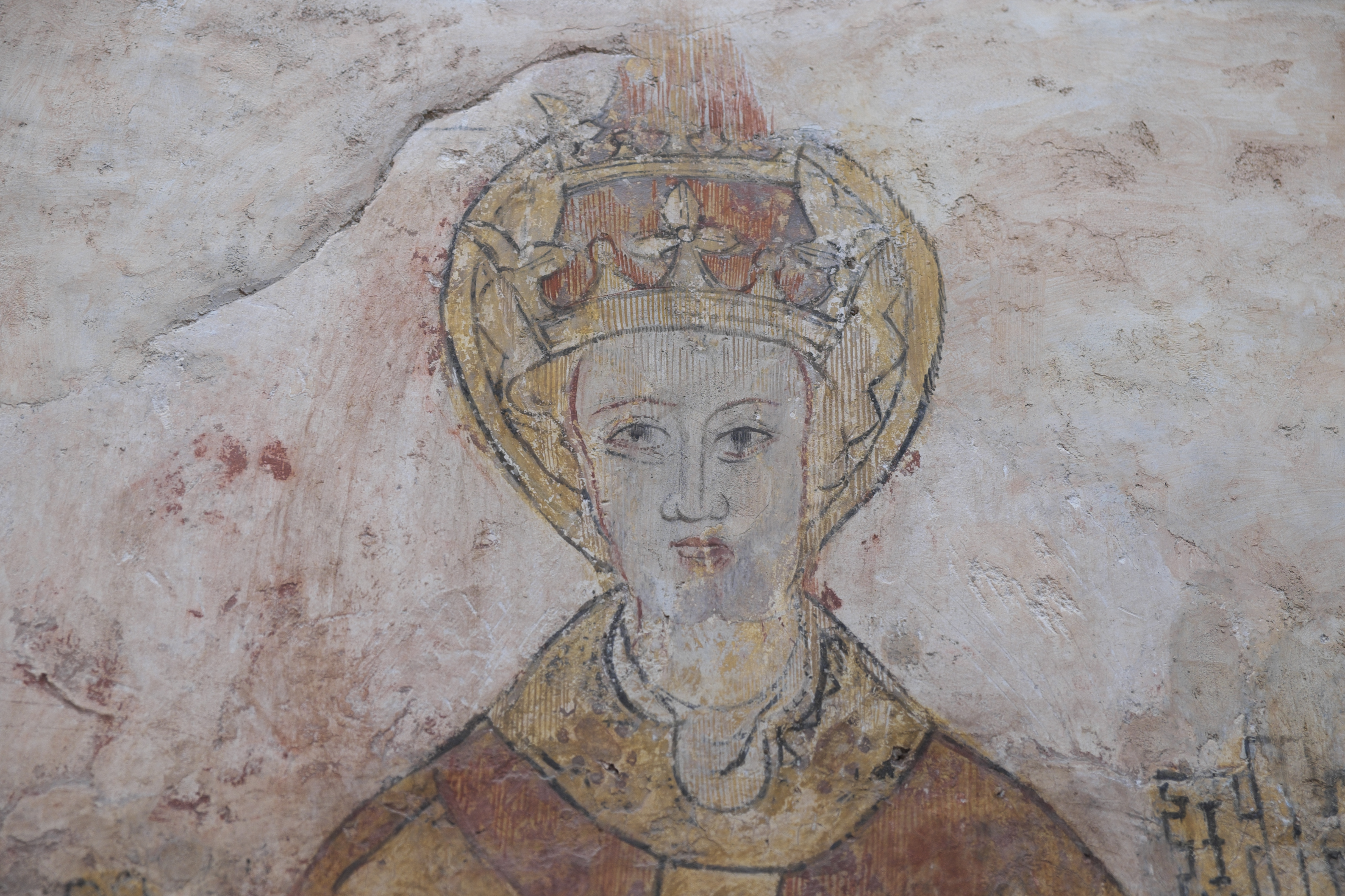 Katholische Pfarrkirche Sainte-Croix, auch Sainte-Agathe, in Ris im Département Puy-de-Dôme (Auvergne-Rhône-Alpes), Wandmalerei